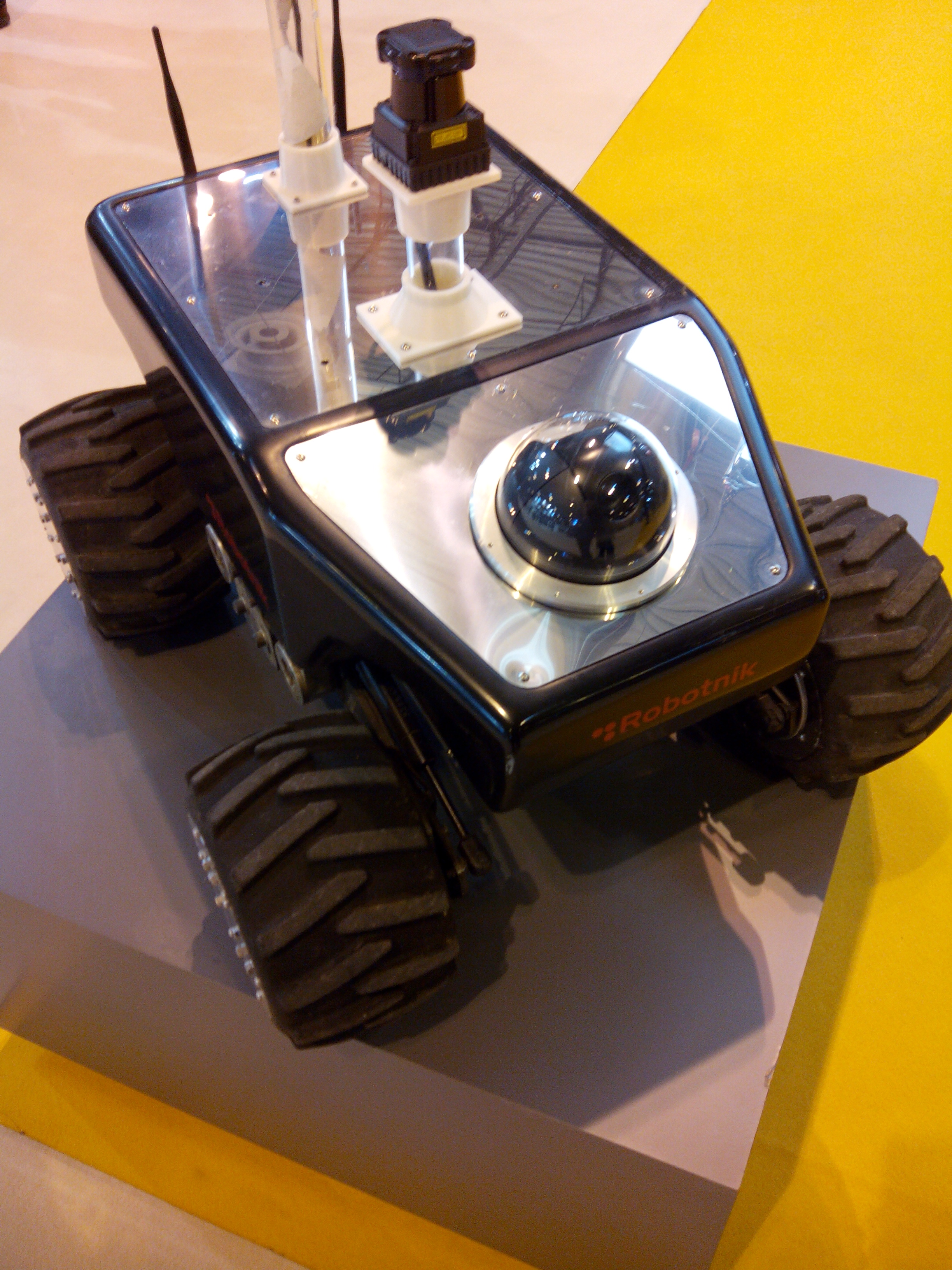 Unidad Robotica, frontal, fabricado por Robotnik.